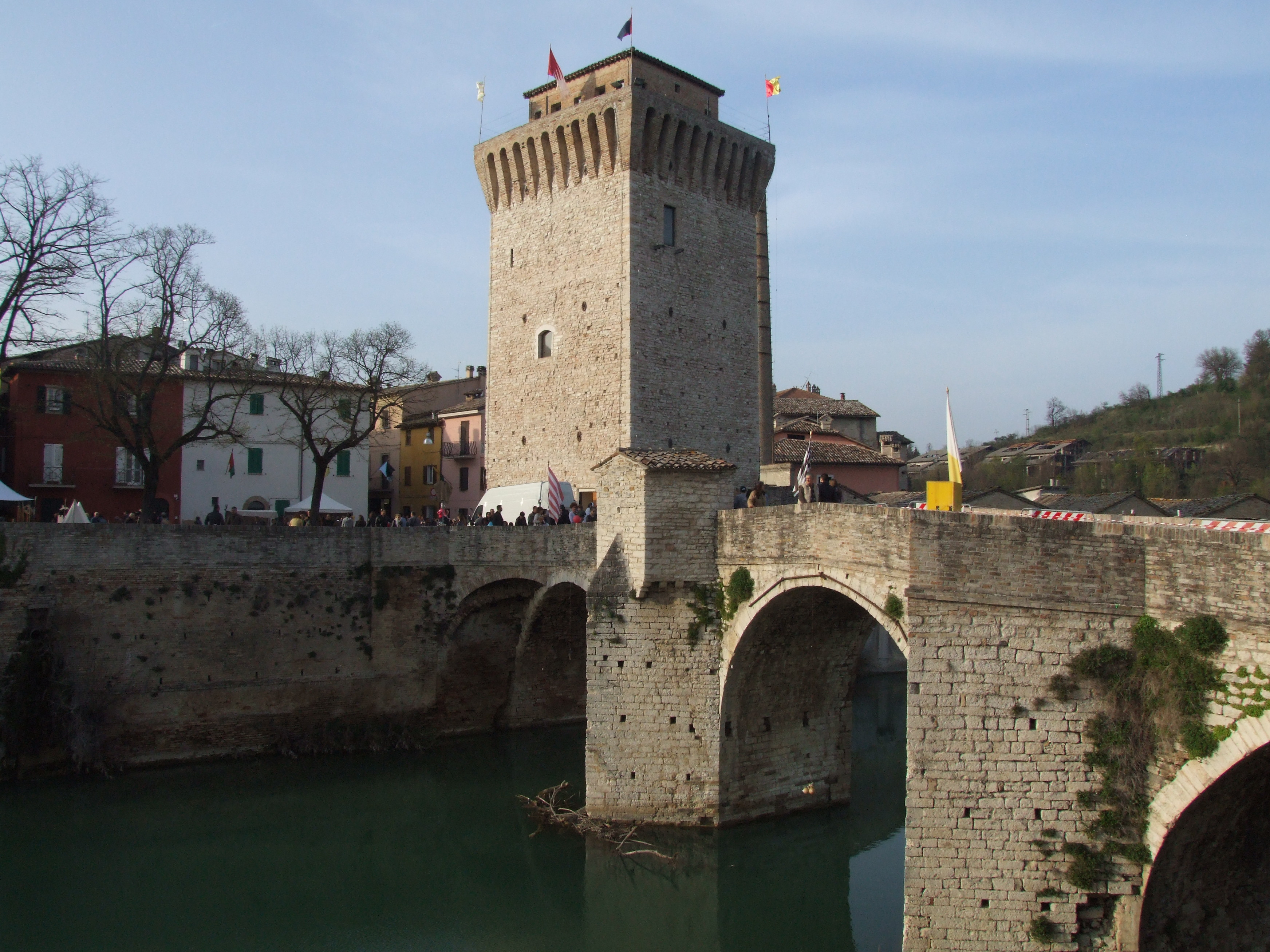 Complesso monumentale, Torre Medioevale e Ponte Romano This is a photo of a monument which is part of cultural heritage of Italy.